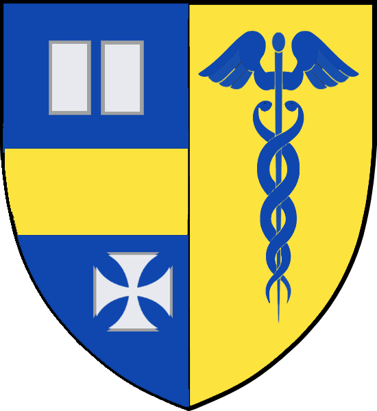 Vapensköld för svenska adelsätten Braunerhielm